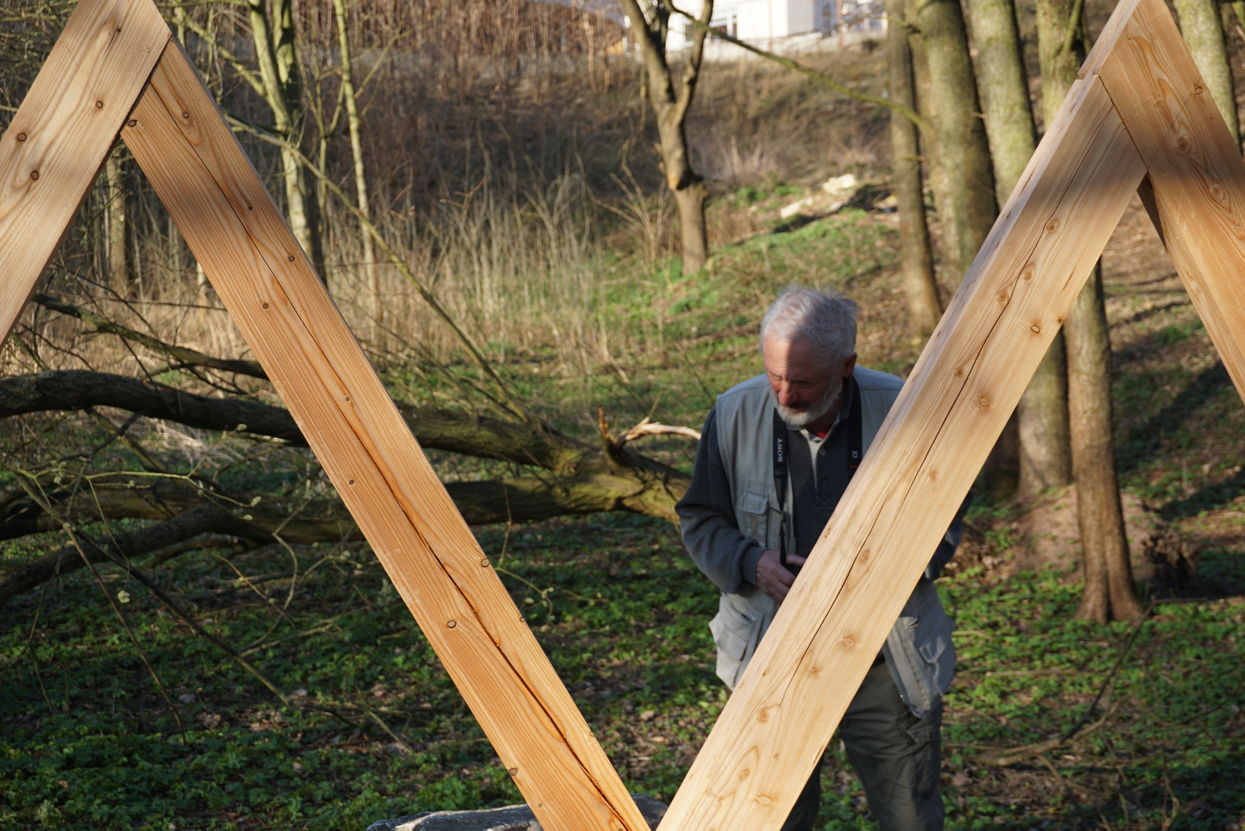 Kurt Gebauer dokončuje Památník zaniklé osady Amerika v Plzni. Památník připomíná zaniklou osadu Amerika. Ta byla zničena bombardováním během 2. světové války a v 70. letech 20. století při stavbě Fakultní nemocnice. Památník byl odhalen 27. dubna 2019.